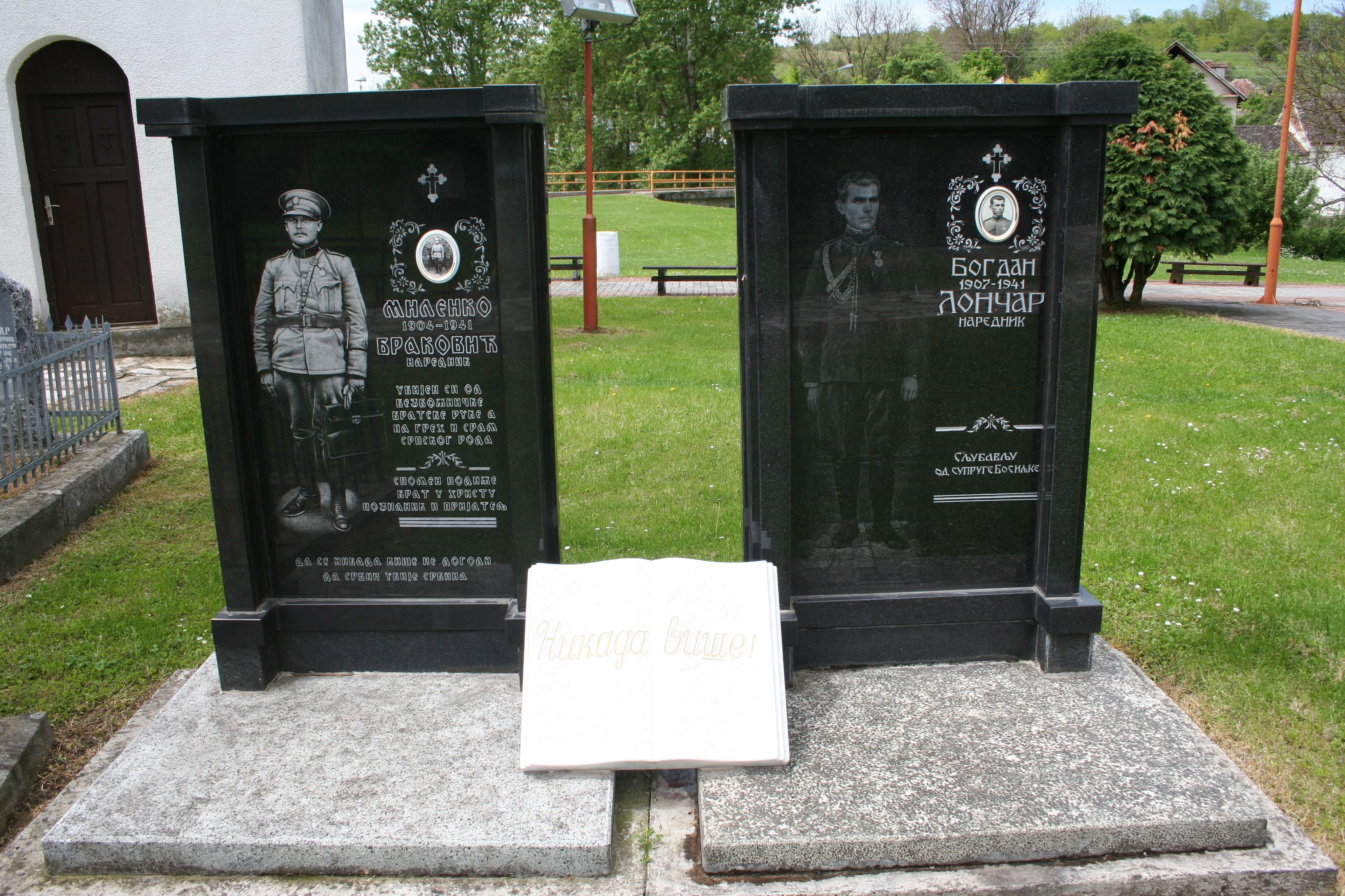 Crkva Sv. Georgija (Bela Crkva)